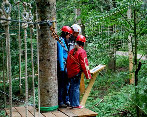 Höhenlehrpfad im Waldklettergarten Enzklösterle